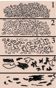 Escala de Gleason para el pronóstico del cáncer de próstata.